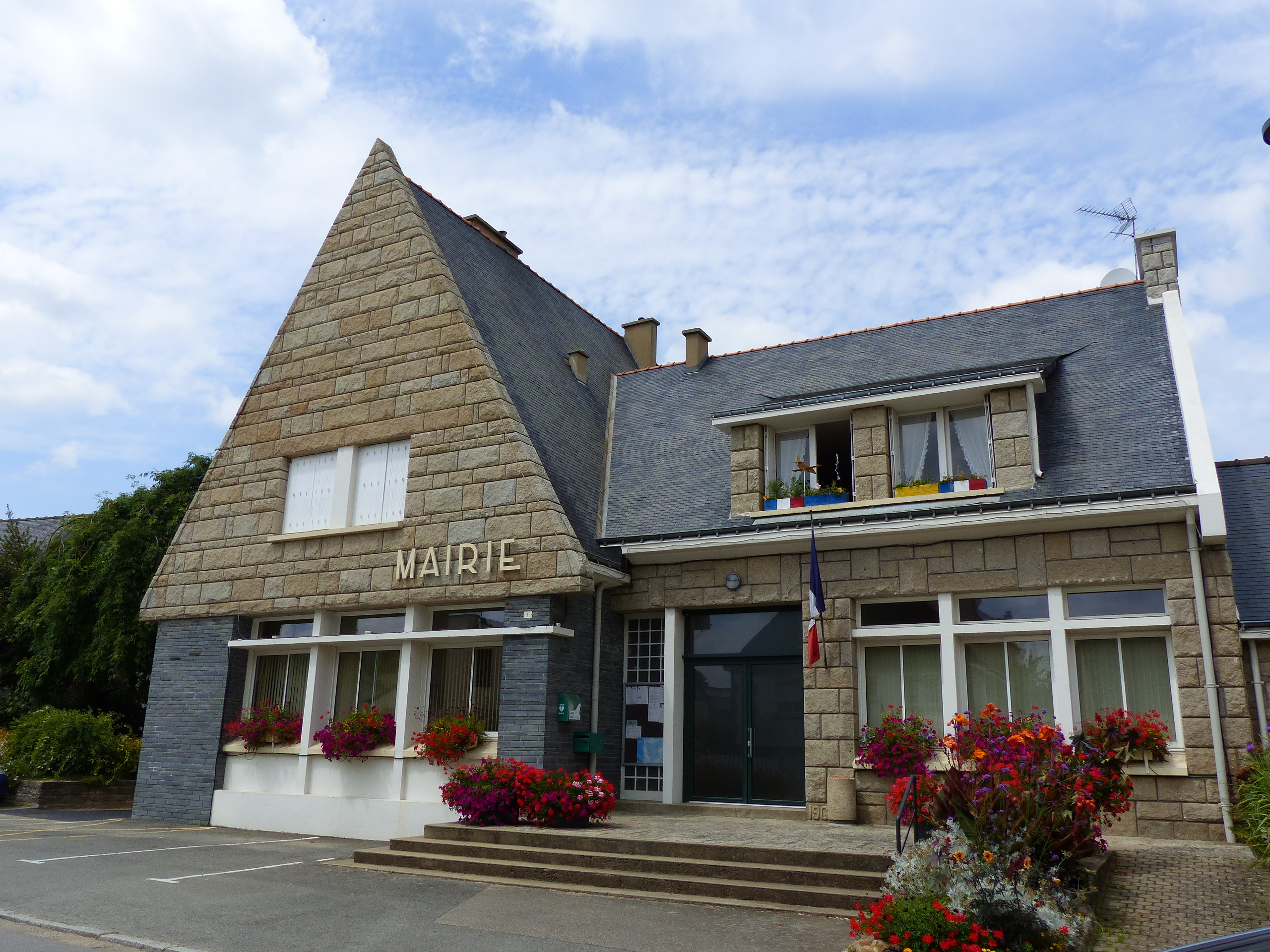 Mairie de Naizin